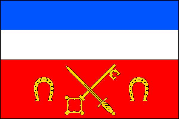 Vlajka obce Kovalovice